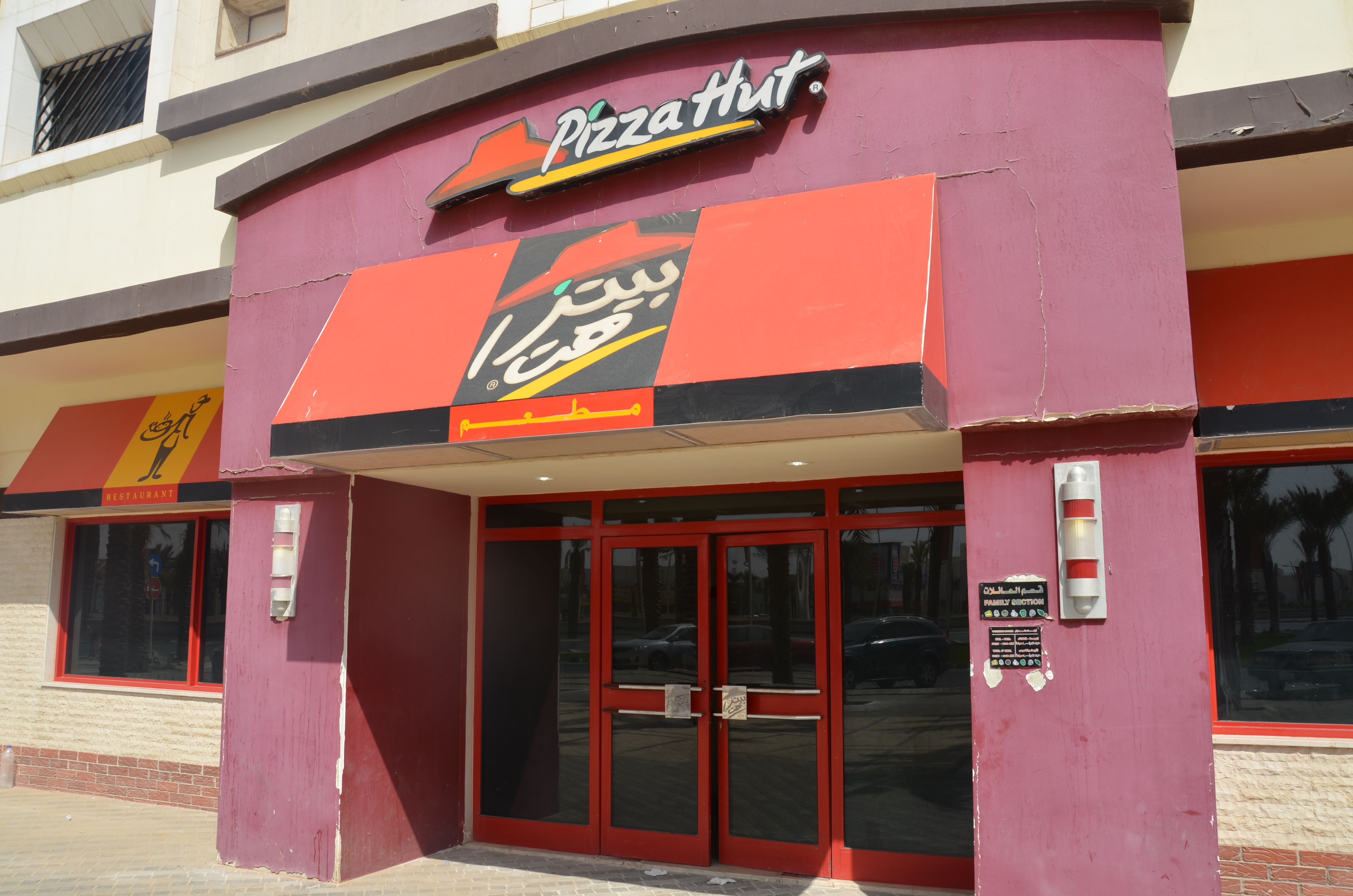 بتزا هت طريق الملك عبدالله حي الورود الرياض